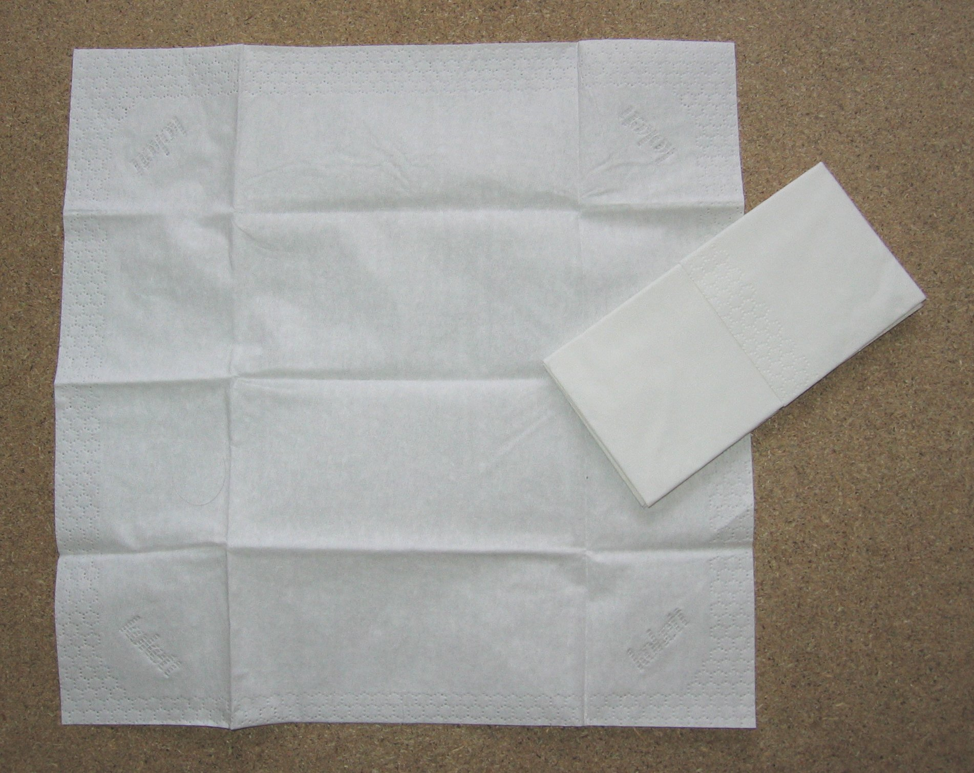 Taschentuch, 2006 selbst fotografiert